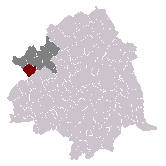 Bois Grenier canton d'Armentières arrondissement de Lille